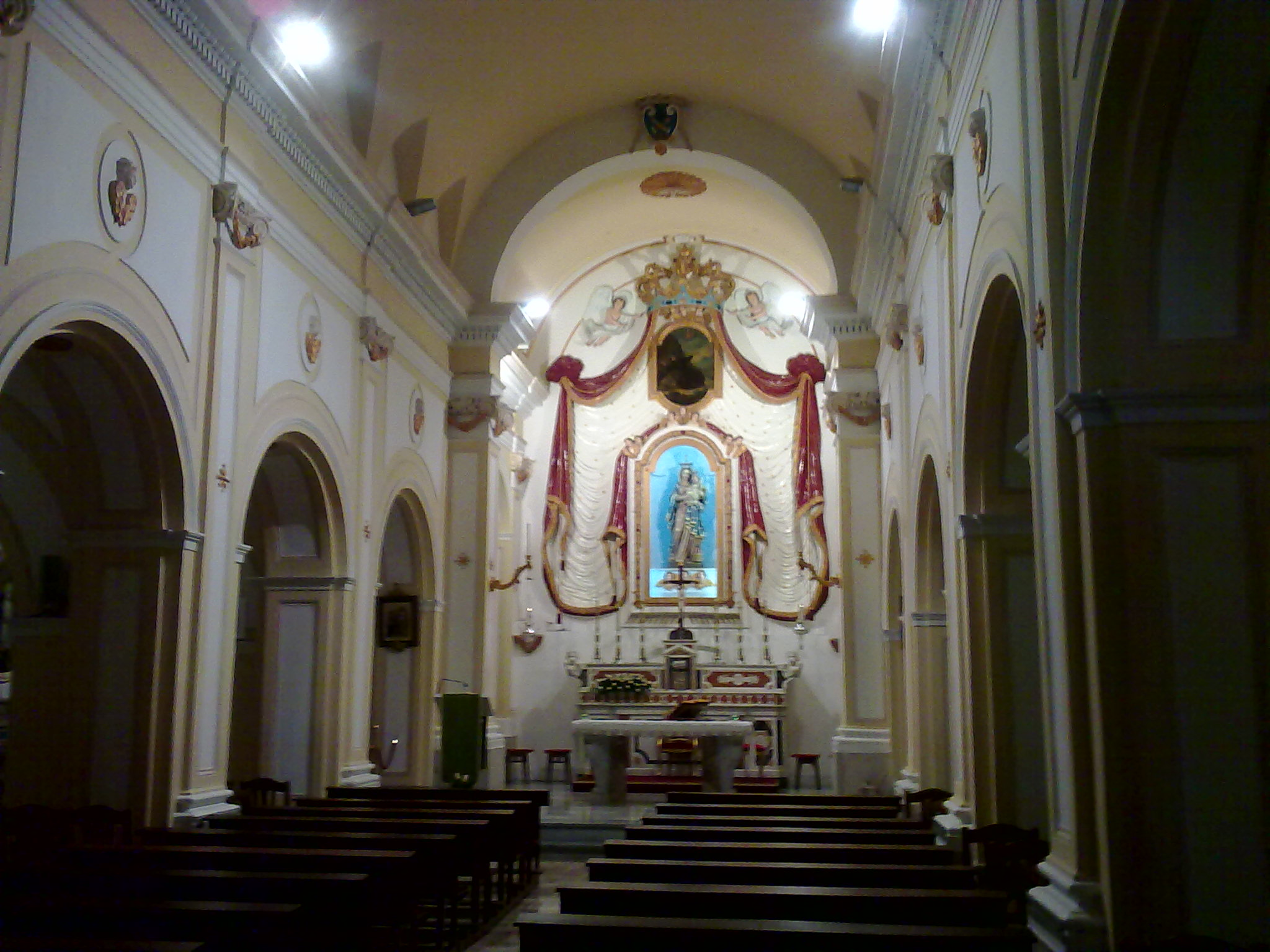 Interno_cappuccini_trani